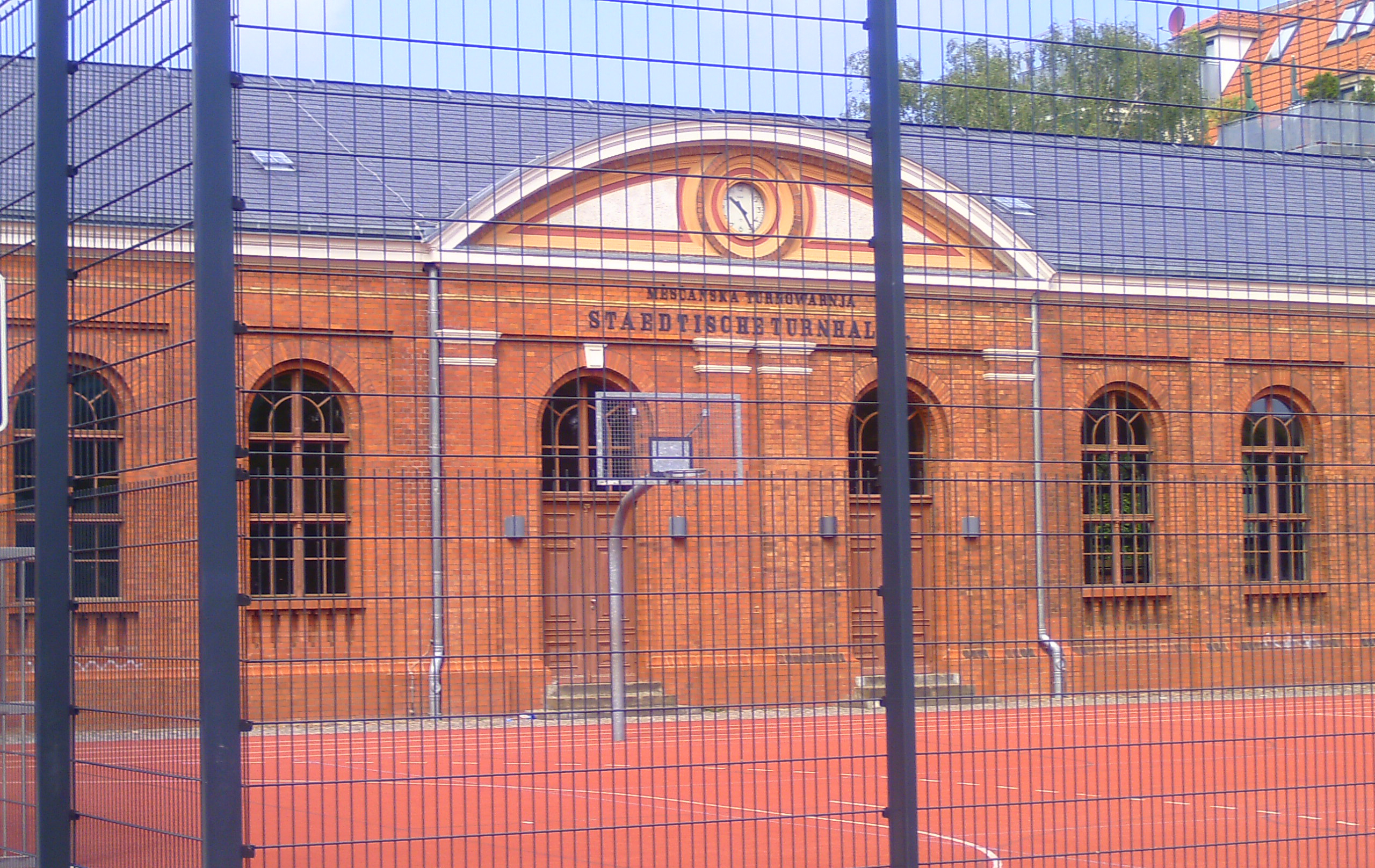 Denkmalgeschützte Städtische Turnhalle in der Friedrich-Ludwig-Jahn-Straße, Cottbus.